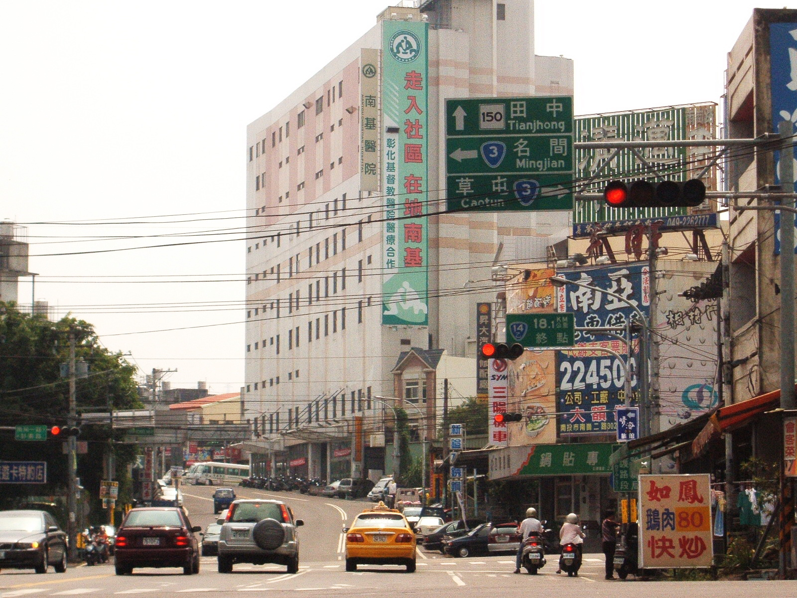 中文（台灣）: 南投縣南投市臺14乙線終點，最高樓為南基醫院。